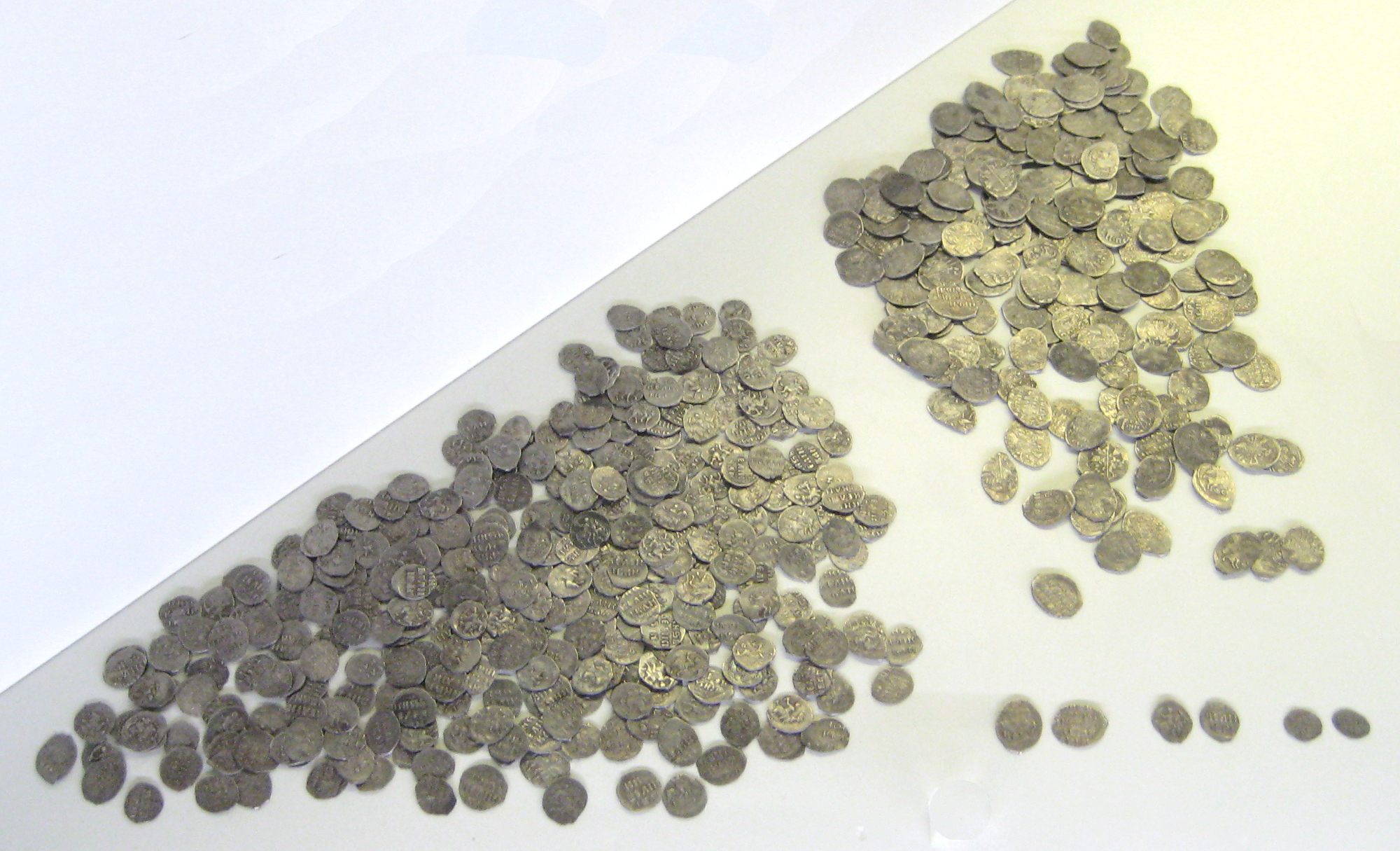 Монеты копейки, деньги и полушки. Эпоха Ивана IV.